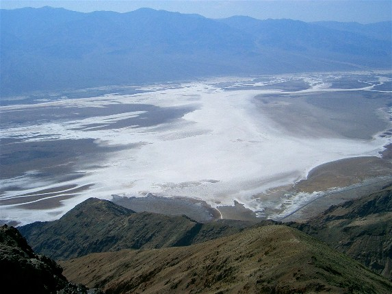 Dante's view, vallée de la mort, Californie J'ai pris cette photo au cours d'un voyage en Californie en 2004. GFDL utilisateur:Urban